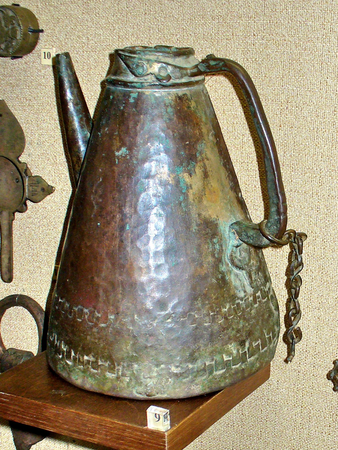 Кувшин - кумган, бронза, Волжская Болгария, X-XIV в.